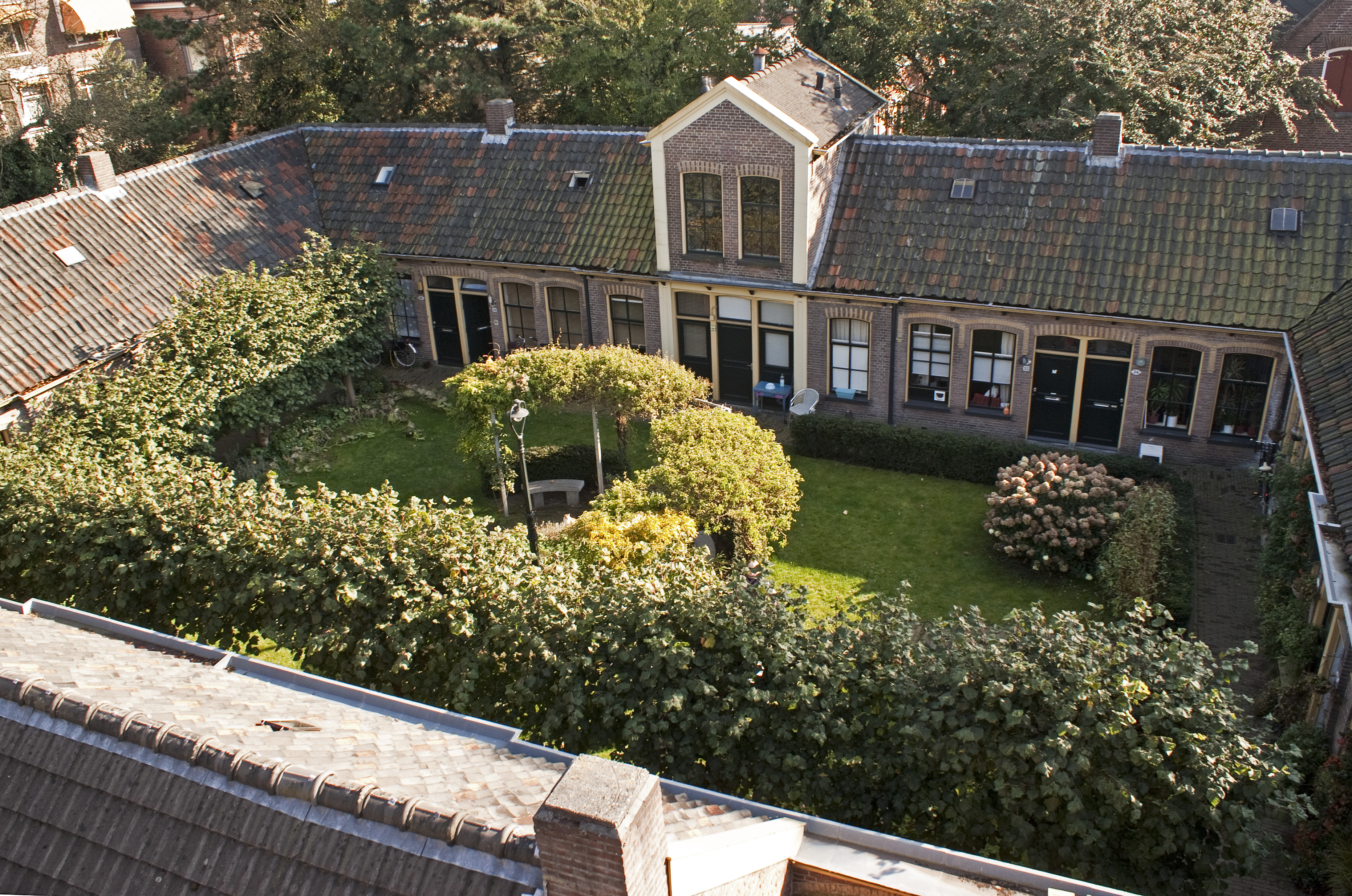 Middengasthuis, najaar 2011